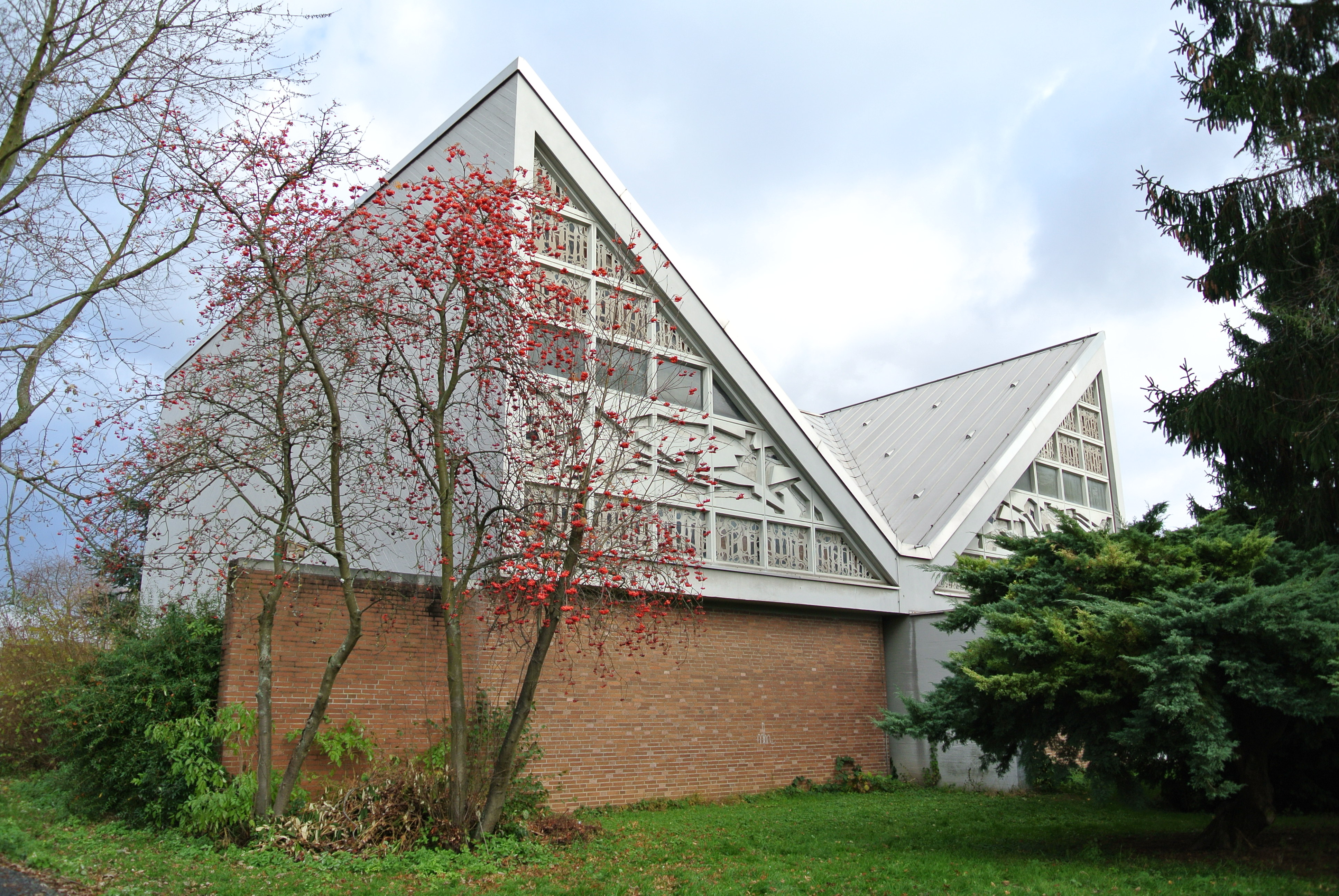 Evangelische Festeburgkirche in Frankfurt-Preungesheim der Architekten Horst Römer und Helmut Baumgart, im Jahr 1969 fertiggestellt